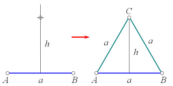 Преобразование 1-тетраэдра в 2-тетраэдр